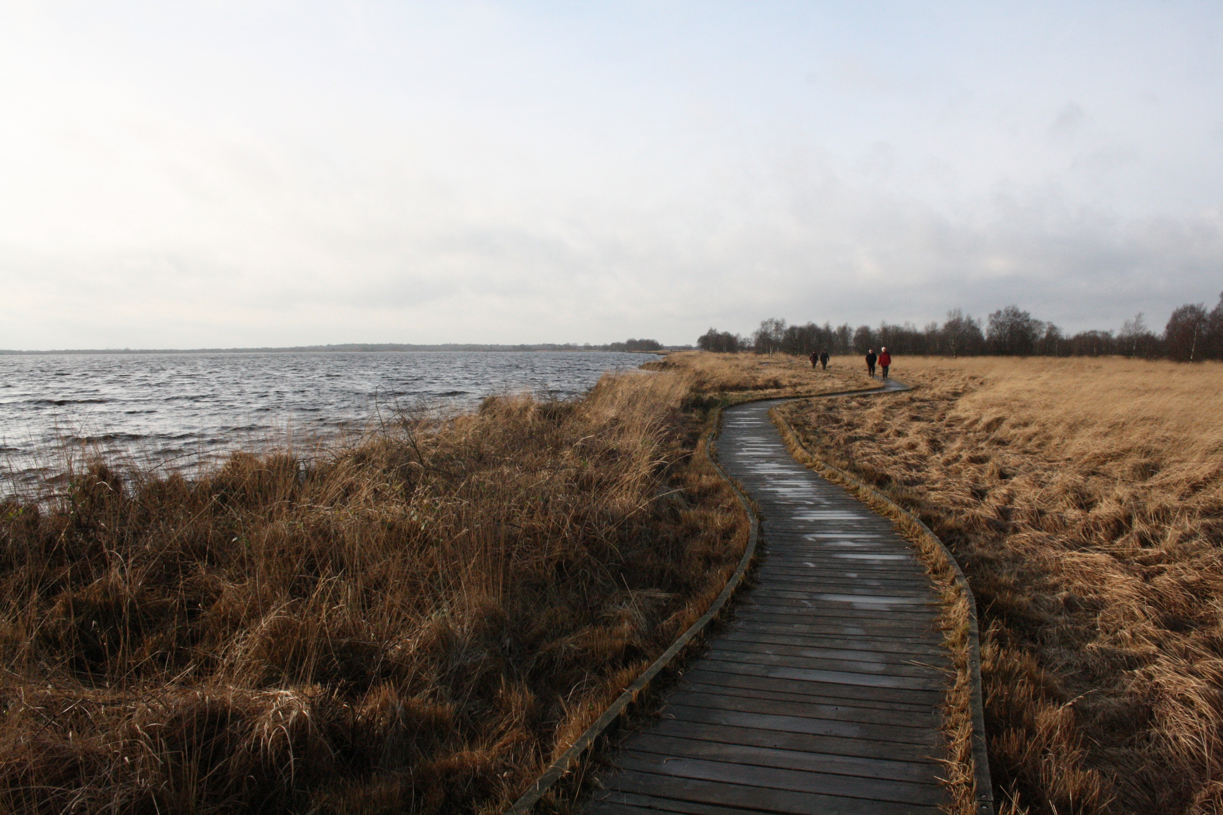 Naturschutzgebiet Ewiges Meer bei Eversmeer, Niedersachsen